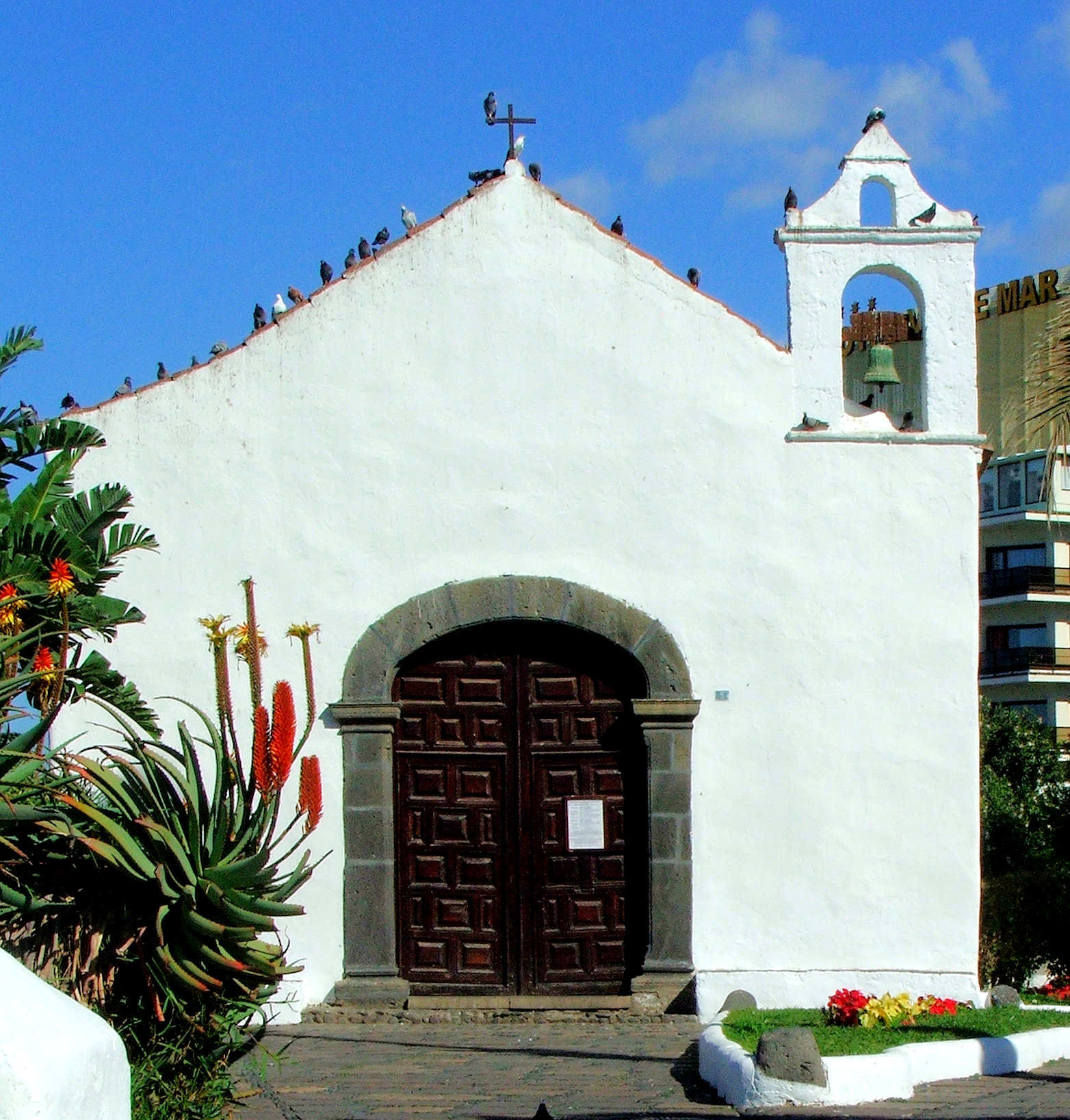 Westfassade der Ermita San Telmo in Puerto de la Cruz